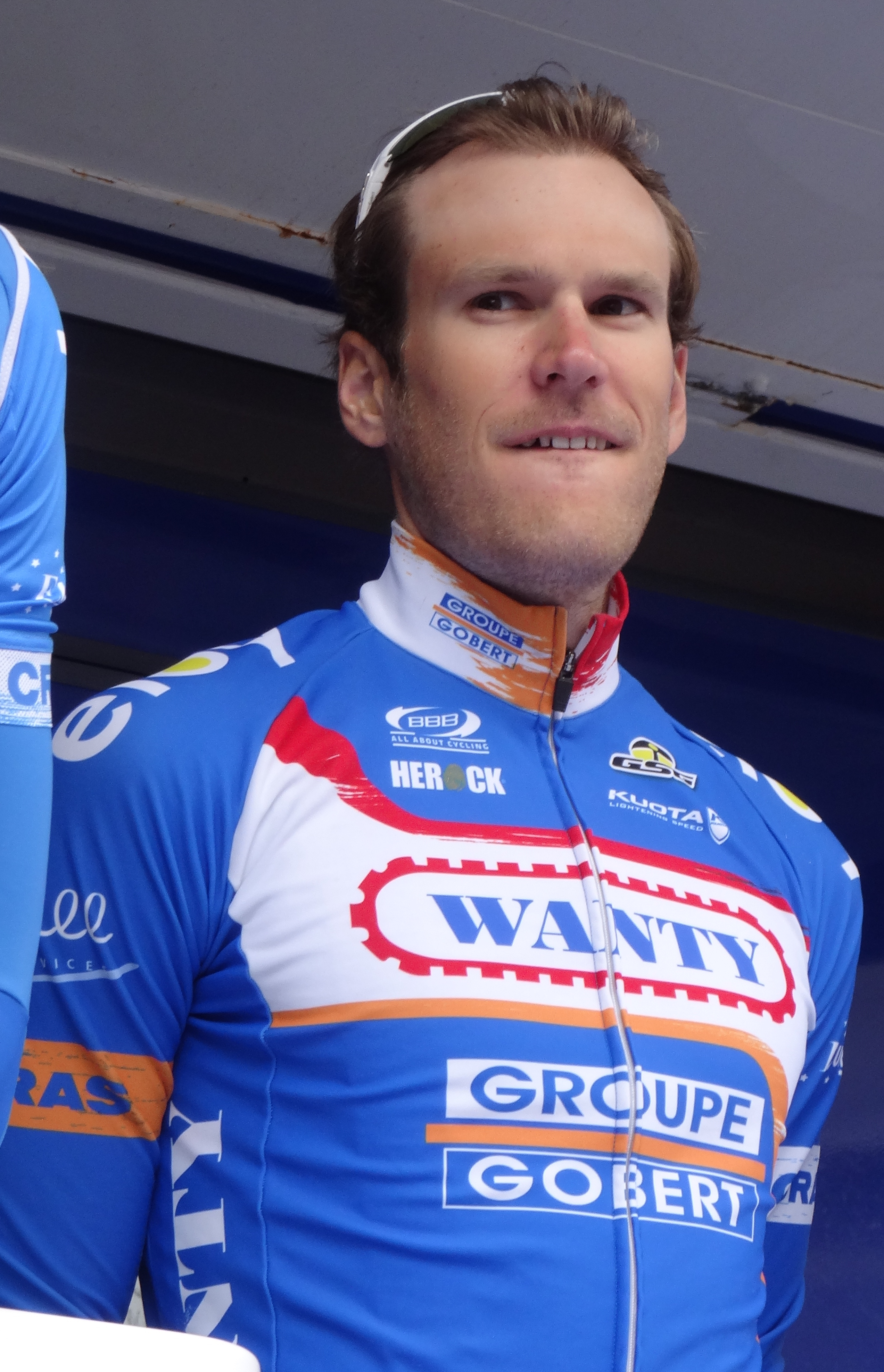 Reportage photographique réalisé le mercredi 7 mai 2014 au départ de la première étape de l'édition 2014 des Quatre jours de Dunkerque à Dunkerque, Nord, Nord-Pas-de-Calais, France. Depicted person: Jempy Drucker Depicted team: Wanty-Groupe Gobert